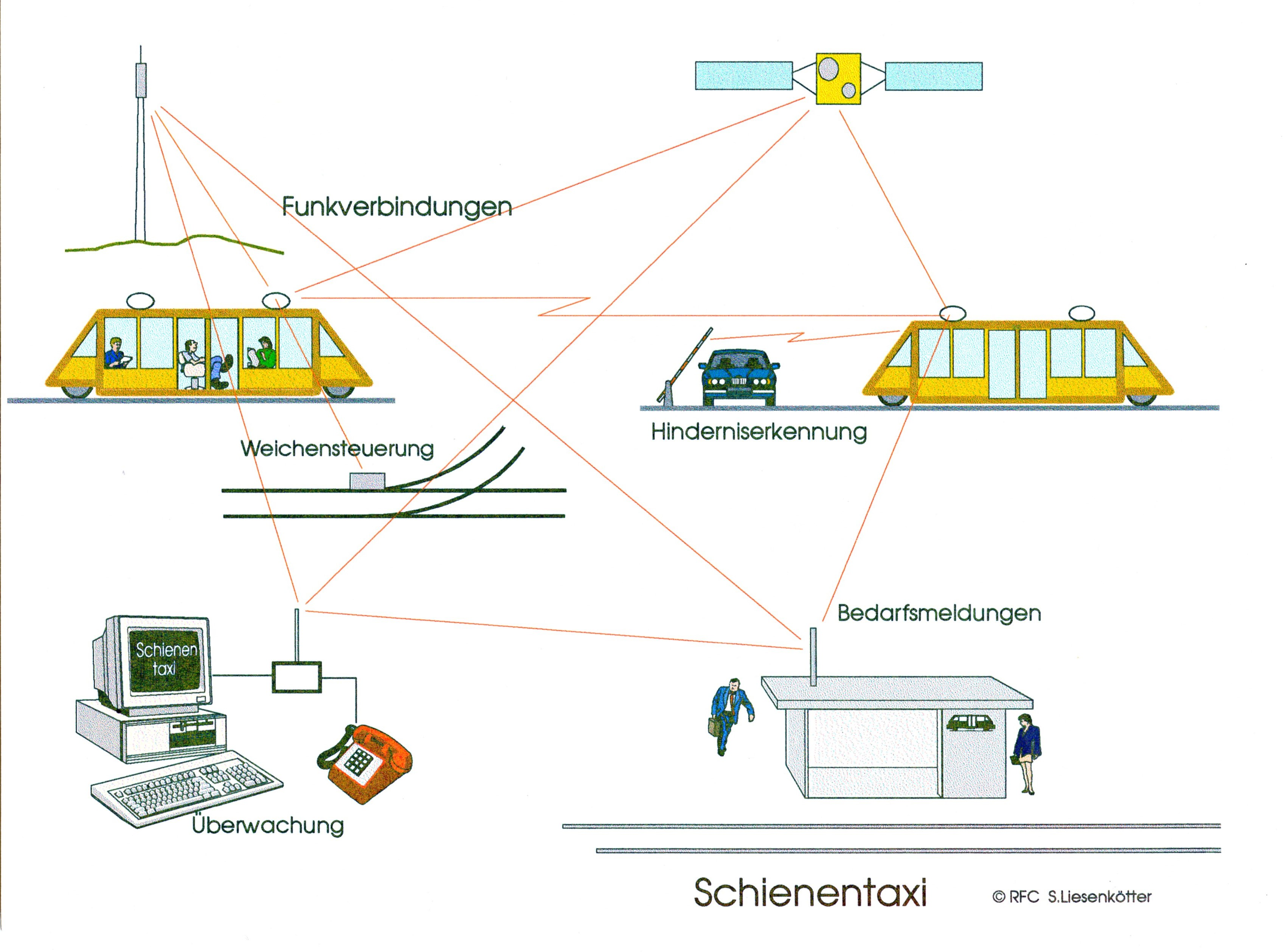 Darstellung des Schienentaxi-Systems